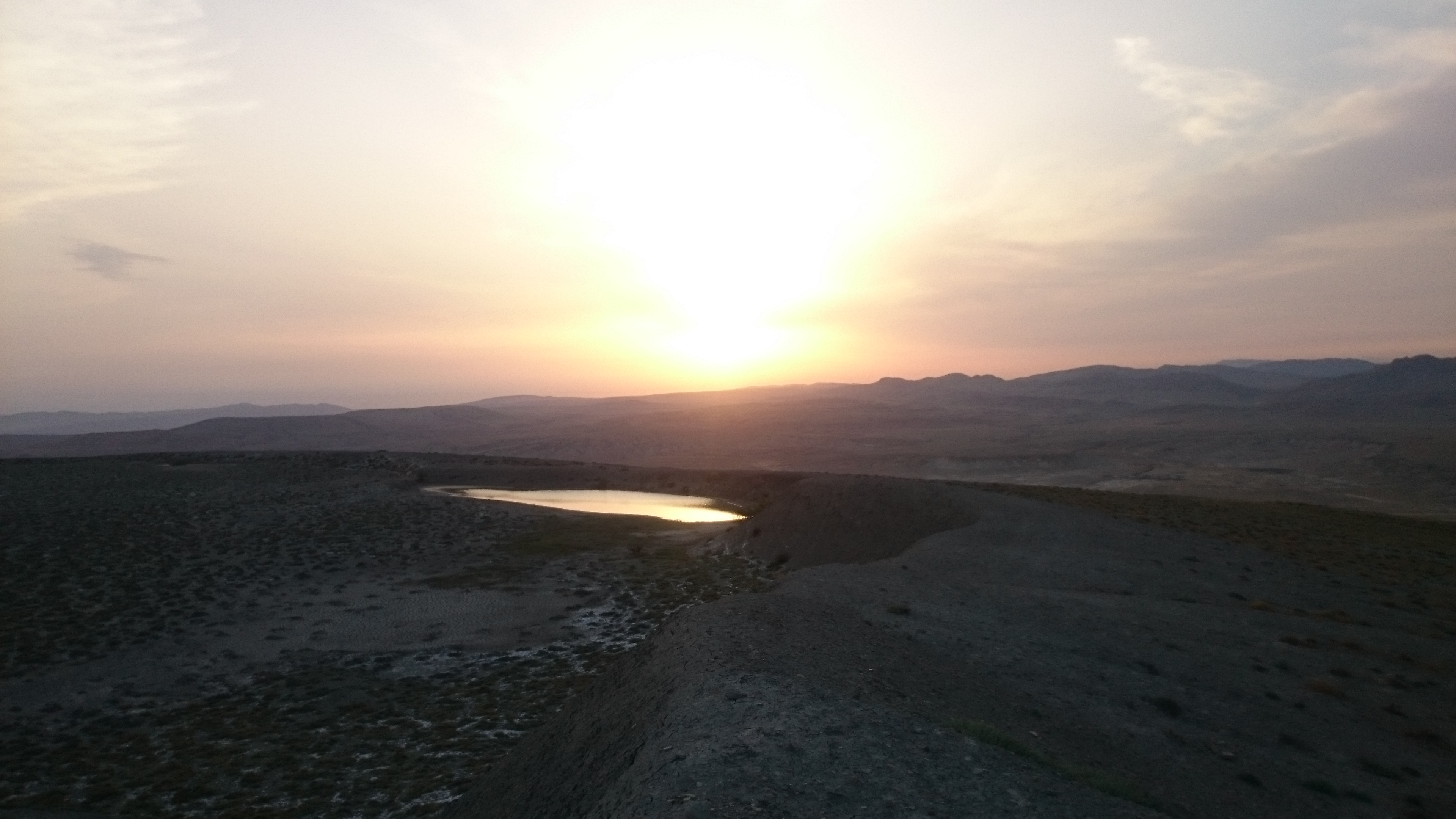 Qobustan vulkan gölü